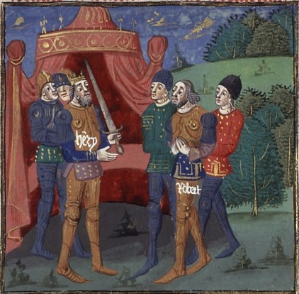 Henri Ier Beauclerc et Robert Courteheuse